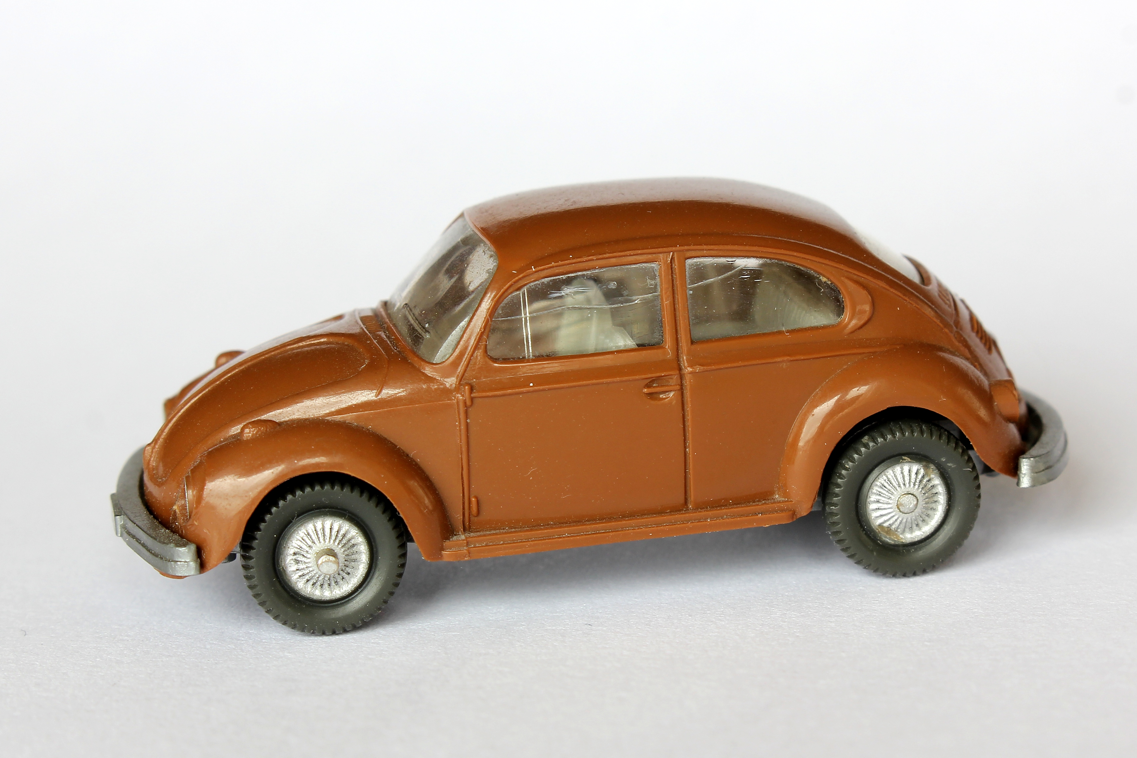 Wiking-Modell „Volkswagen 1303“, Maßstab 1 : 87, Länge des Modells: 47,5 mm, erschienen um 1975